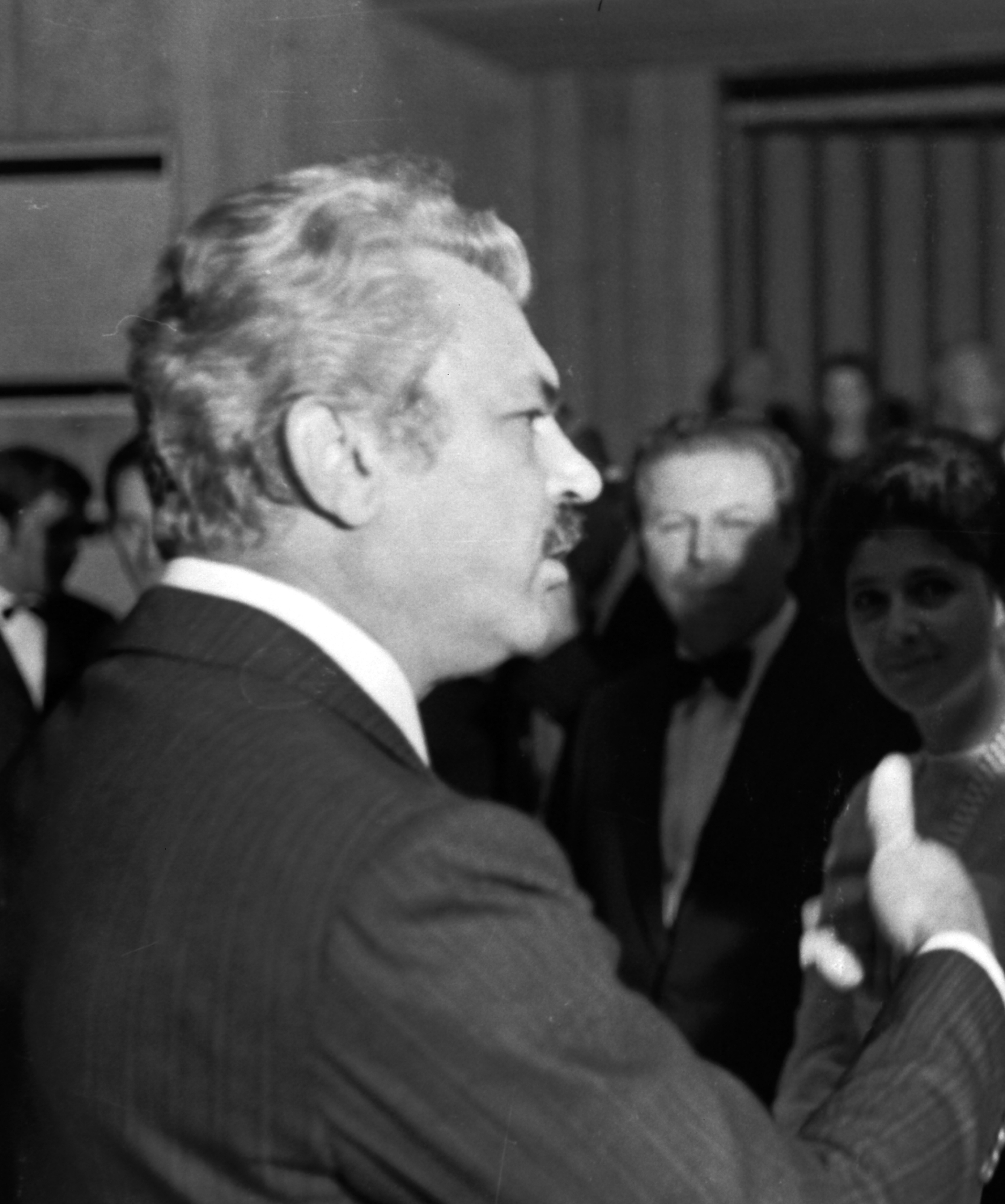 Stevan Kragujević foto: Sergej Bondarčuk i Orson Vels, Sarajevo, 29. novembar 1969. godine. Premijera filma Bitka na Neretvi (po odobrenju Tanje Kragujević, kćerke S. Kragujevića)